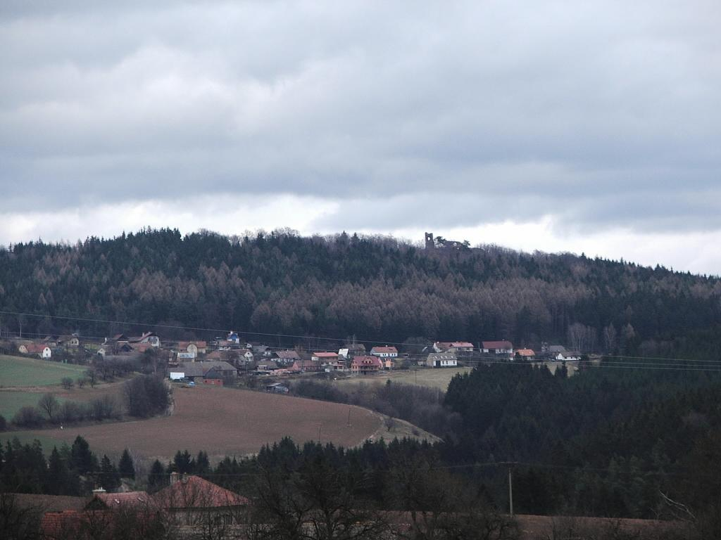 Pivonice nad obcí torzo hradu Zubštejn.Pohled od obce Dvořiště přes údolí říčky Bystřice.